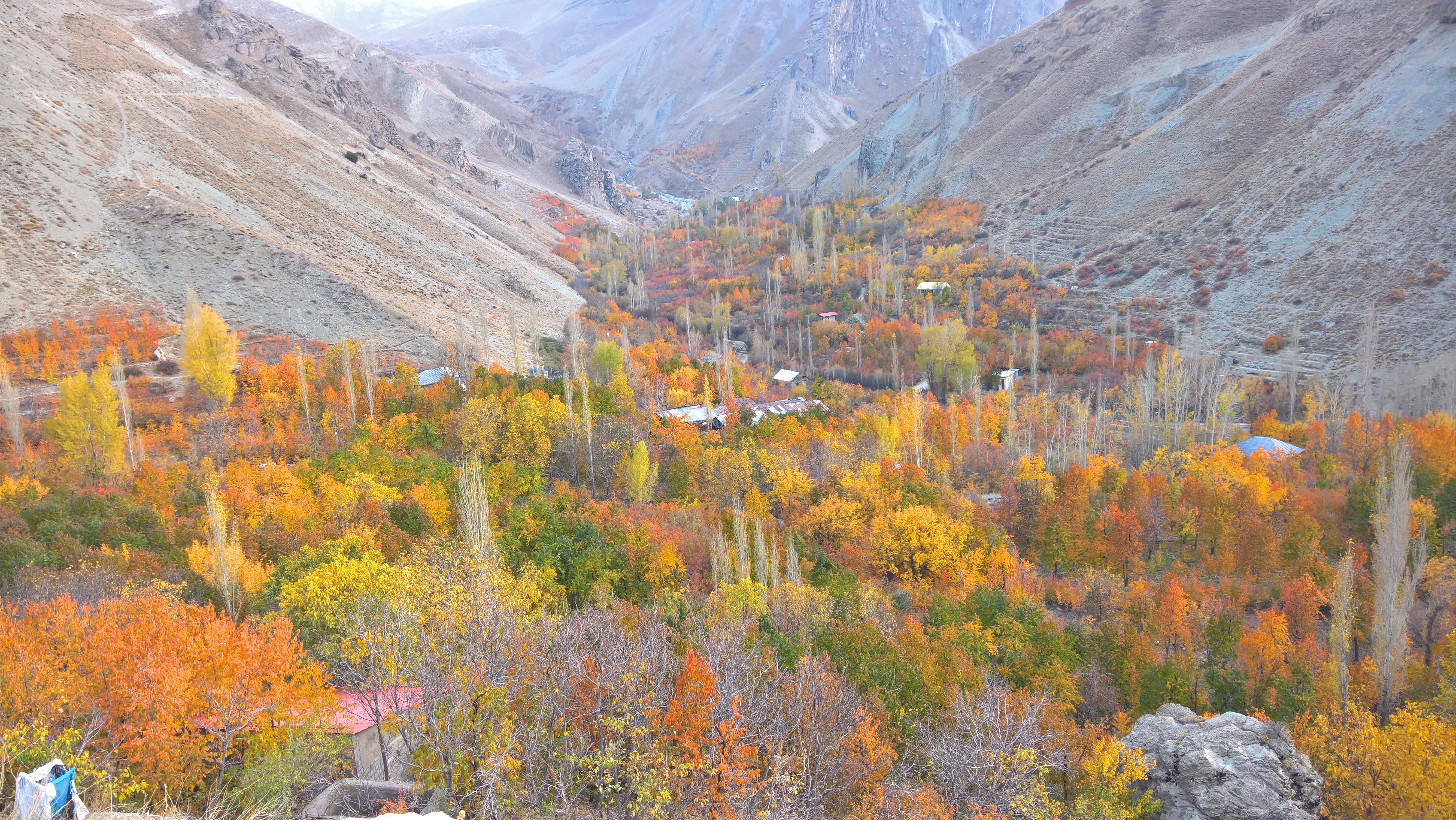 کاخ شهرستانک